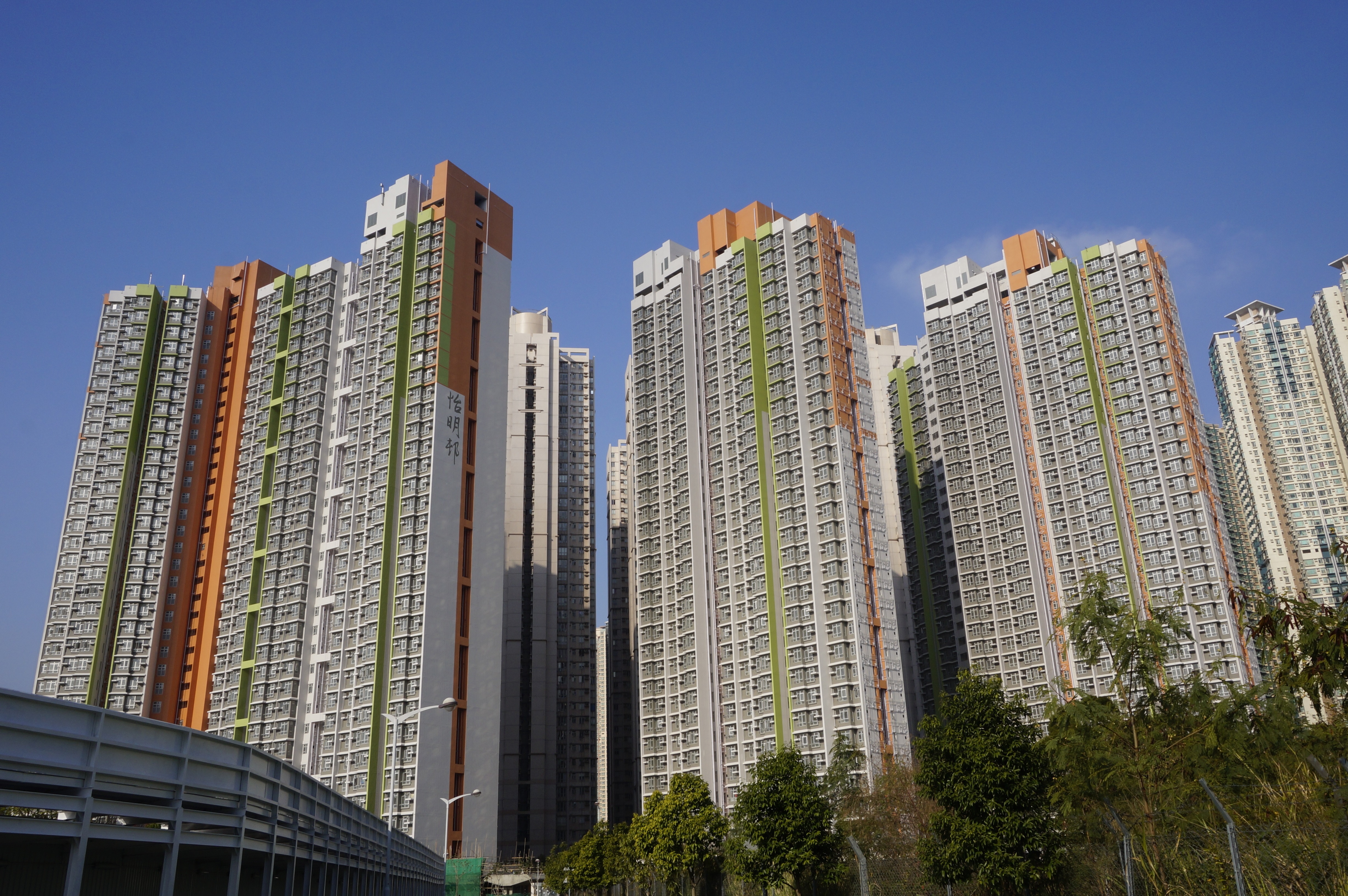 怡明邨各座大廈